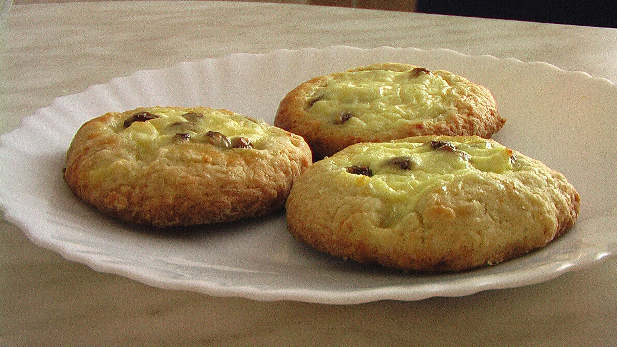 Ватрушка (Vatrushka)